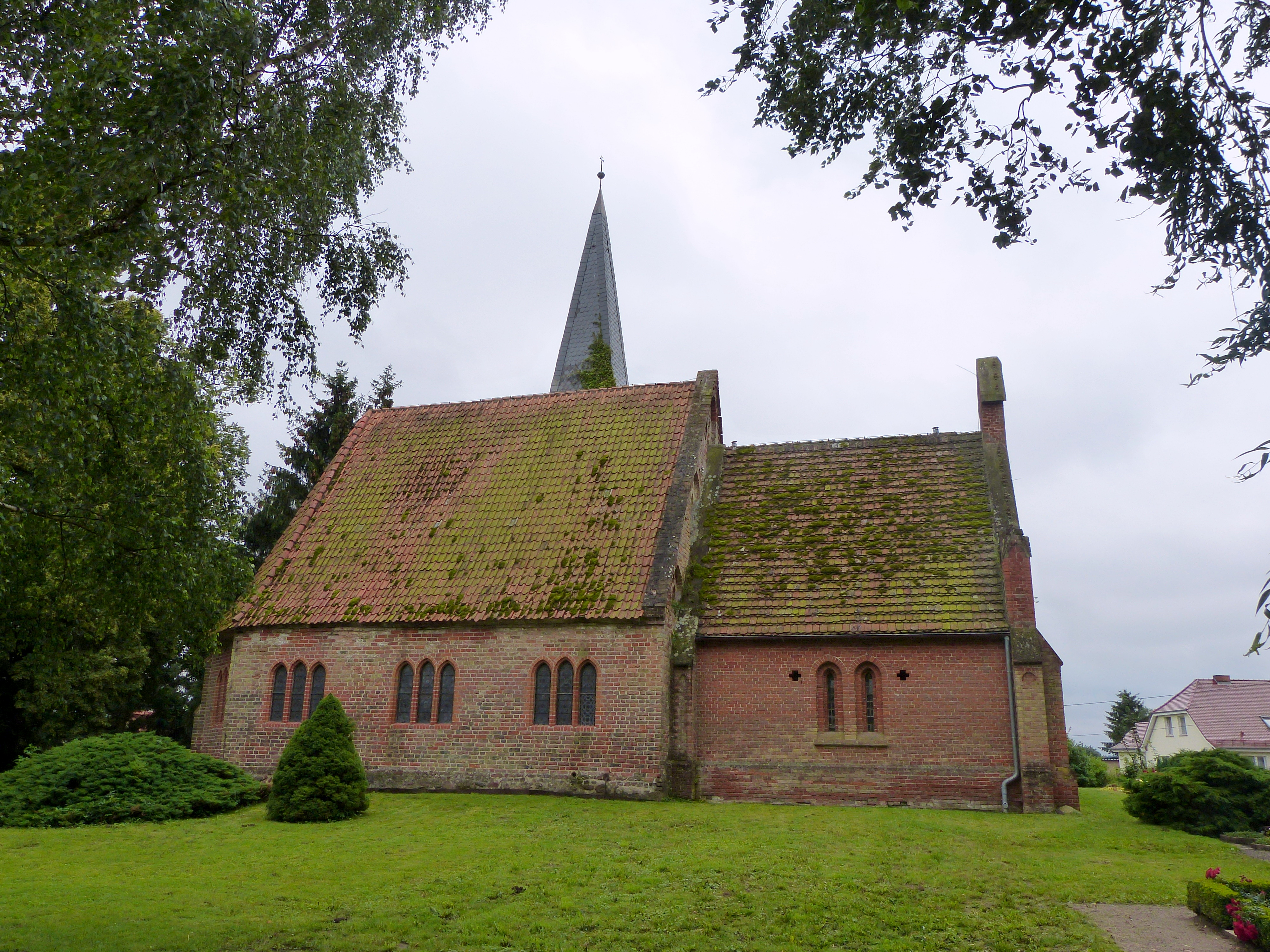 Kirche in Lüssow bei Gützkow